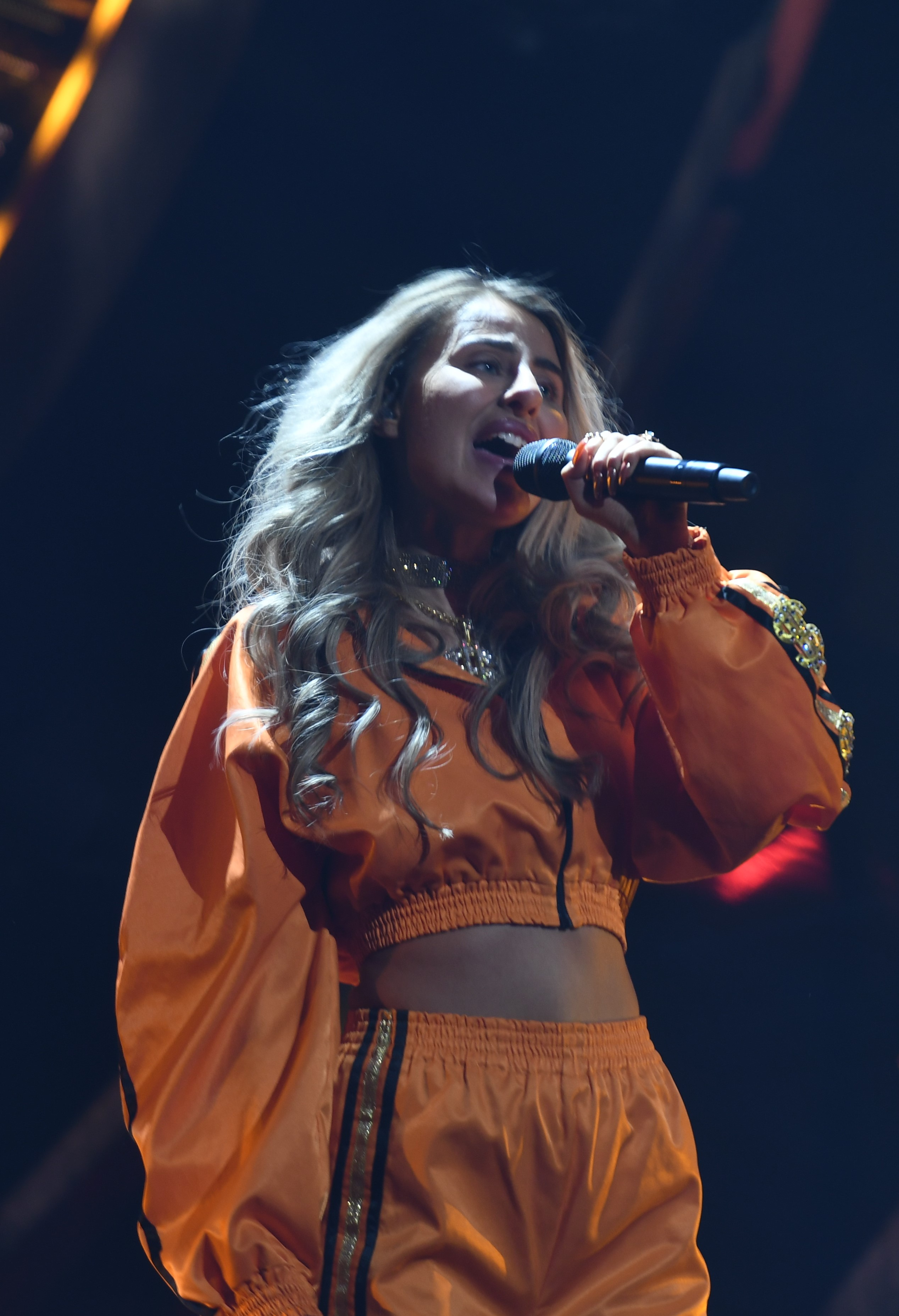 Melodifestivalen 2019, deltävling 1, Scandinavium, Göteborg, Zeana